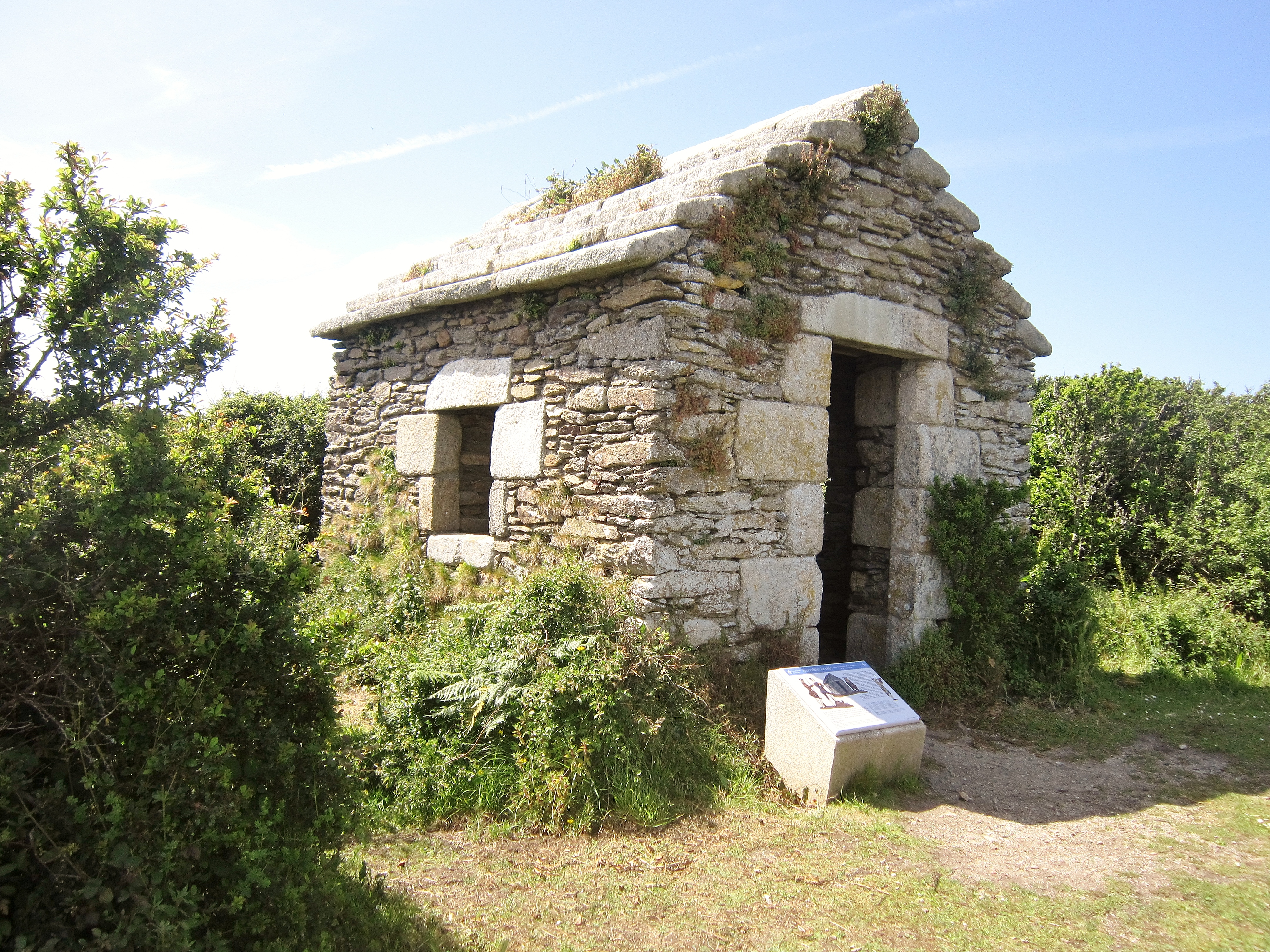 Locmaria-Plouzané : la "maison des douaniers" de Ruvras (Ru Vraz). Cette construction en pierres de taille est un poste d'observation de la milice garde-côte chargée de surveiller le littoral afin de prévenir des invasions ennemies, notamment anglaises. De là on a une vue stratégique depuis l'anse de Bertheaume jusqu'au goulet de Brest. Constitué de recrues locales, la réputation de la milice est épouvantable : elle est formée de paysans mal armés et peu disciplinés, obligés de quitter les travaux des champs pour occuper, de jour comme de nuit, des corps de garde souvent délabrés et ouverts à tous les vents. À partir de la Révolution française la surveillance des côtes est transférée au service des douanes ; les différents postes d'observation sont aménagés et reliés entre eux par le "chemin des douaniers", transformés de nos jours en sentier de grande randonnée.